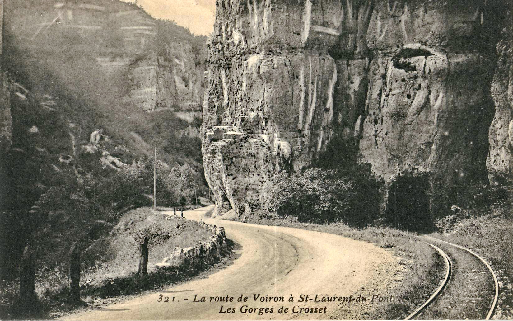 Carte postale éditée par Marf. Martinotto frères à Grenoble, n°321 : La route de Voiron à Saint-Laurent-du-Pont - Les Gorges de Crosset